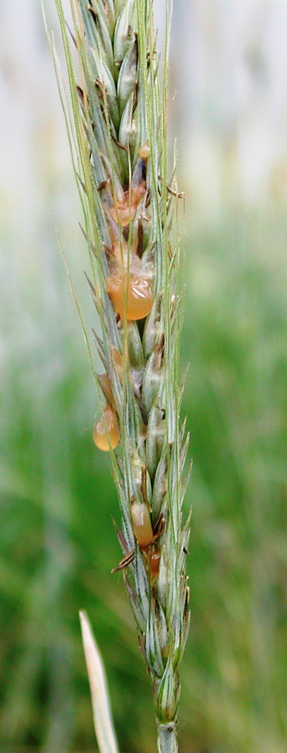 Sphacelia segetum Claviceps purpurea Miellat